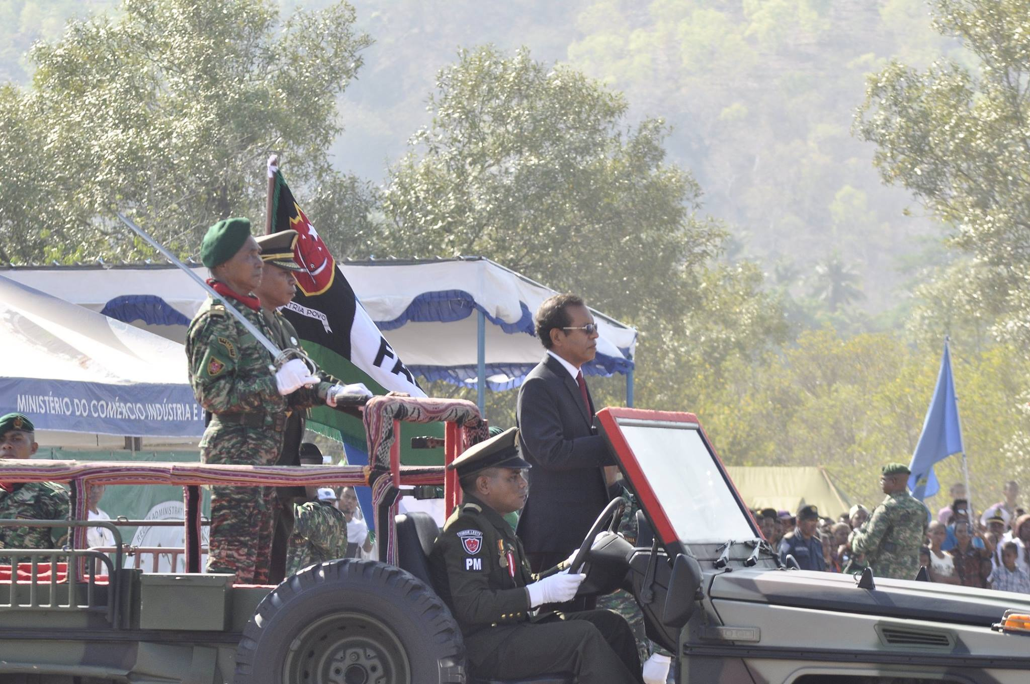 Tetun: Serimónia Komemorasaun Loron Proklamasaun Indpendénte